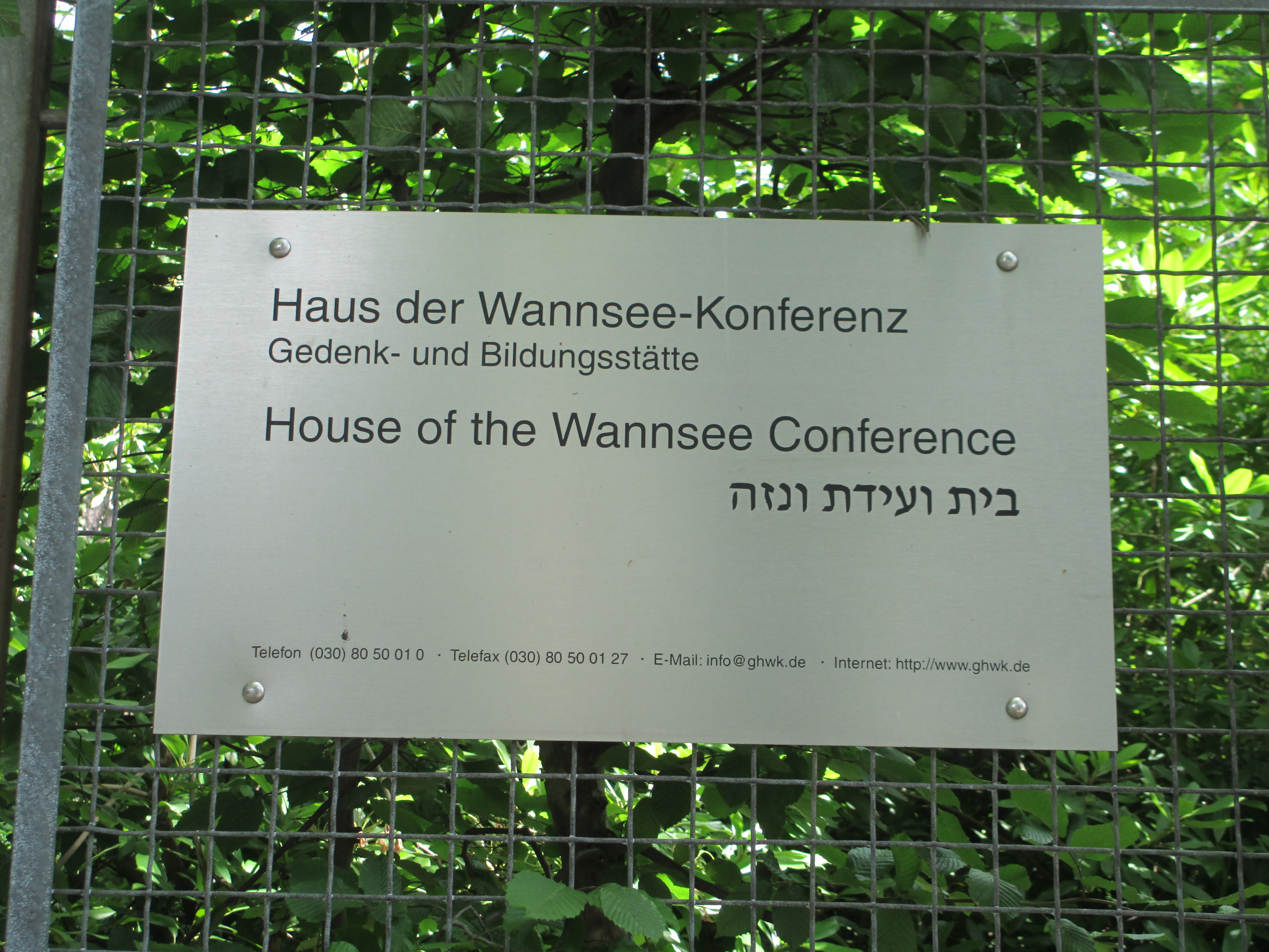 שלט בכניסה לווילה ואנזה